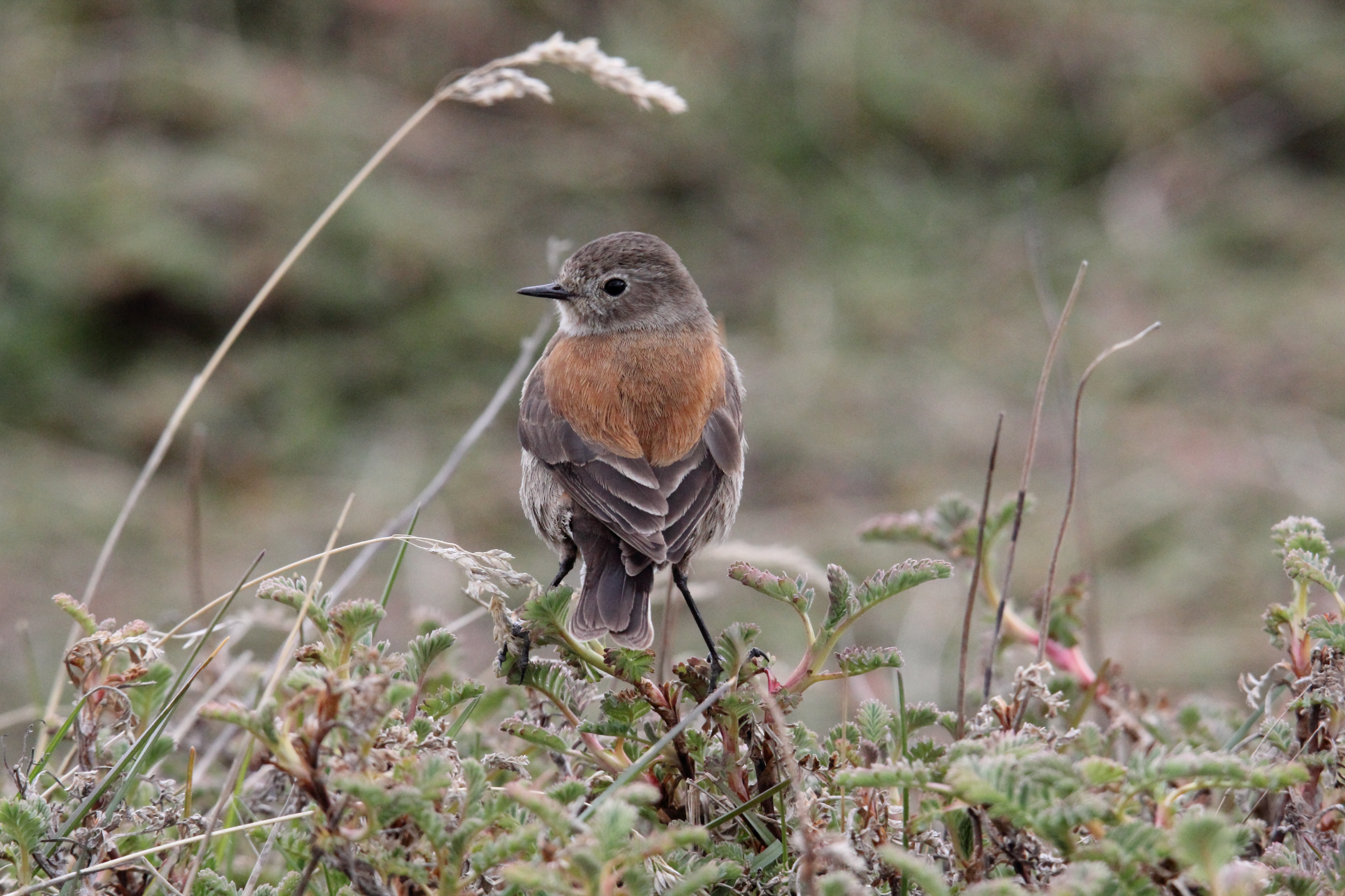 Female